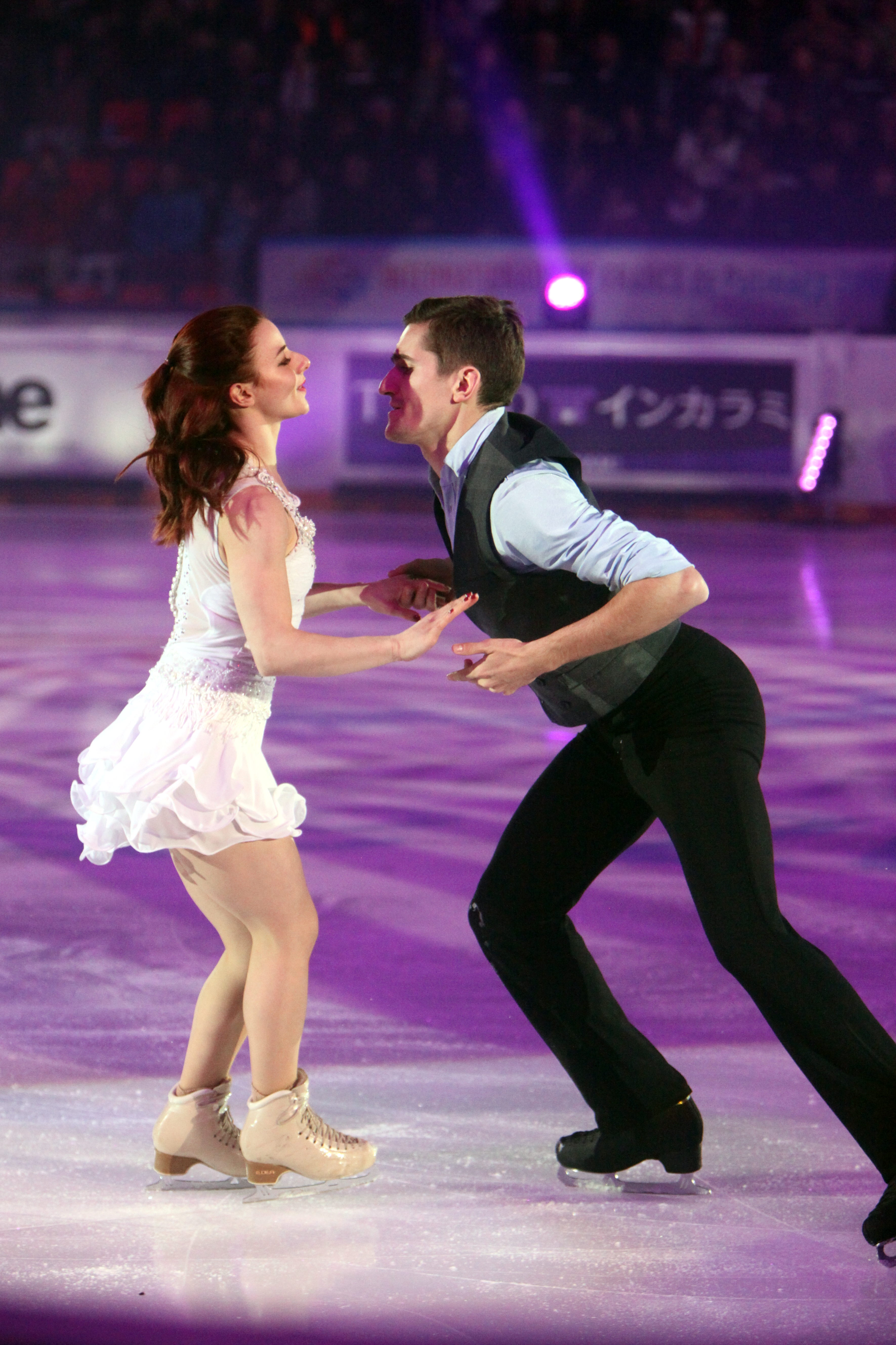 Marie-Jade Lauriault and Romain Le Gac during the gala at the Internationaux de France de Patinage 2018.